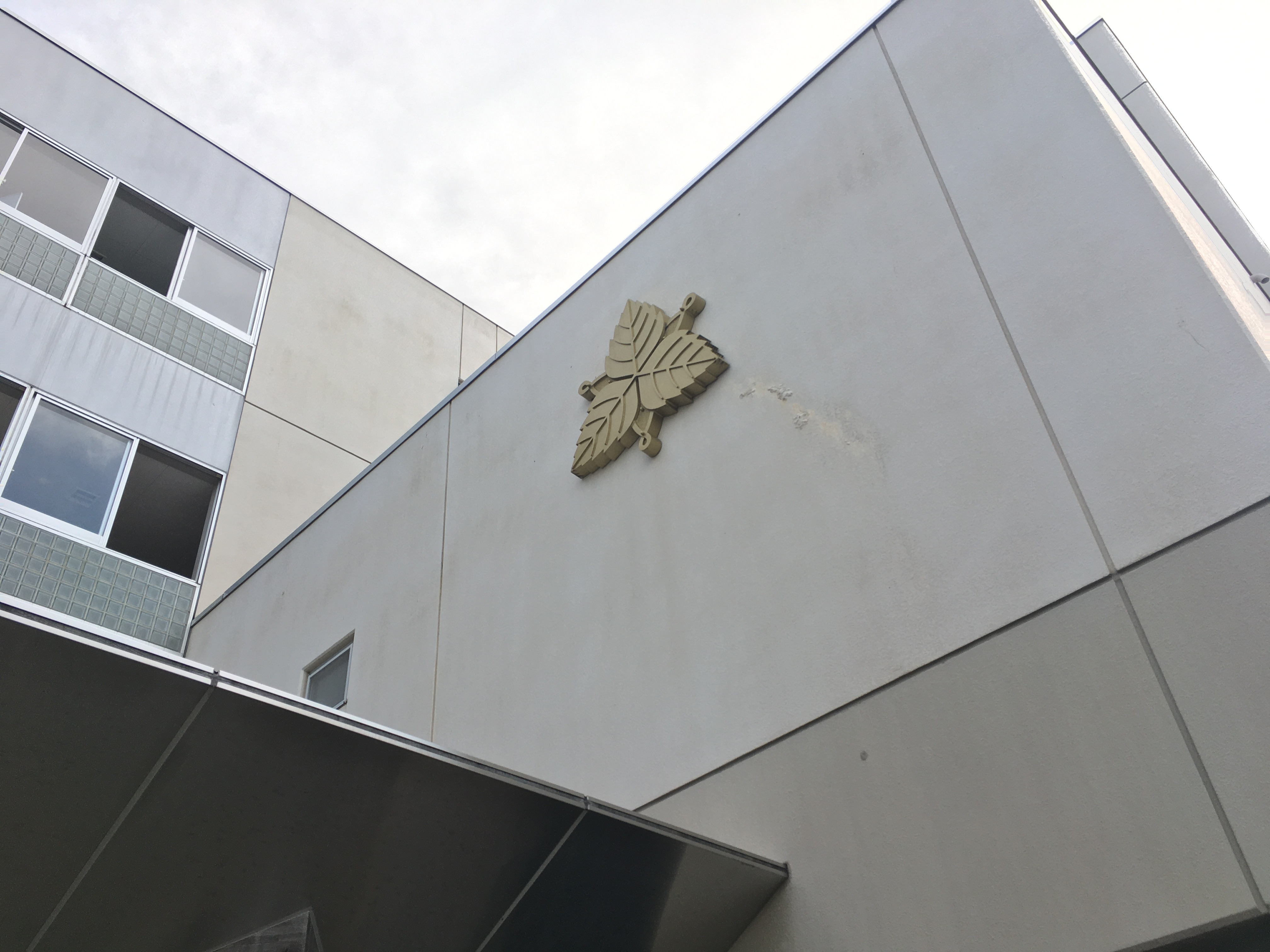 撮影後の加工等無し